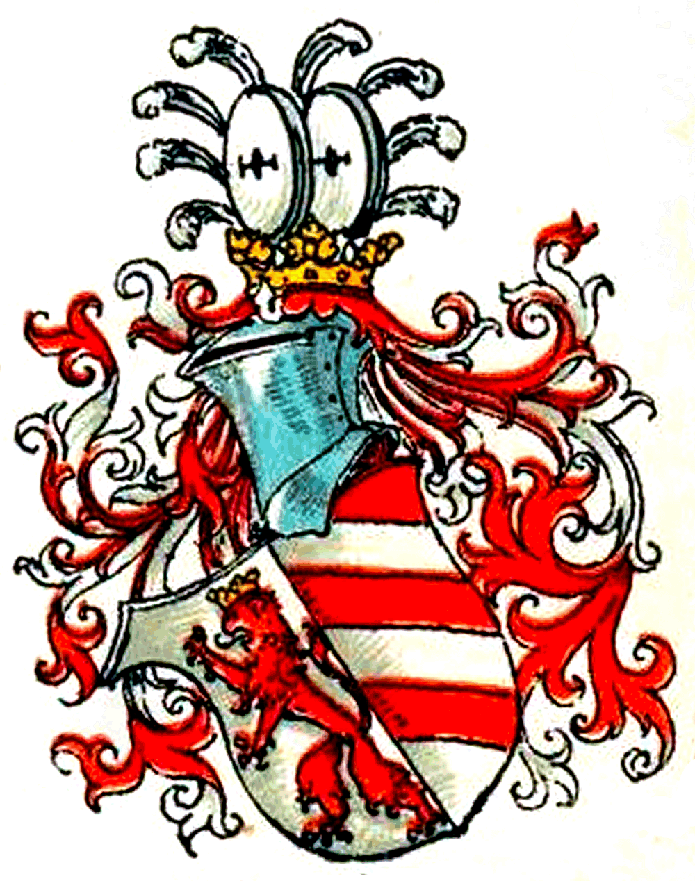 Stammwappen derer von Rothenburg